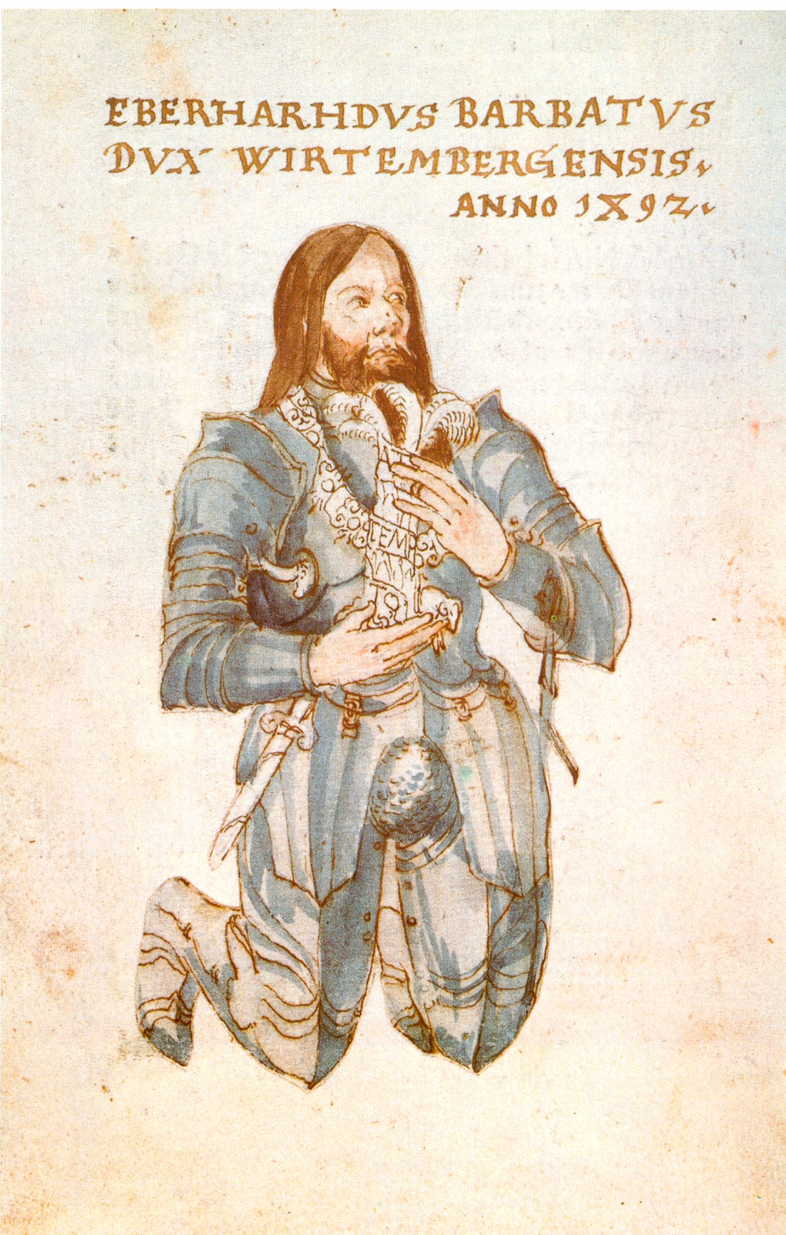 Graf Eberhard I. von Württemberg. Kolorierte Federzeichnung um 1550, eingeklebt in ein Exemplar der Stiftungsbriefe für das Stift St. Peter zum Einsiedel im Schönbuch, Ulm 1493 (GW 9181).